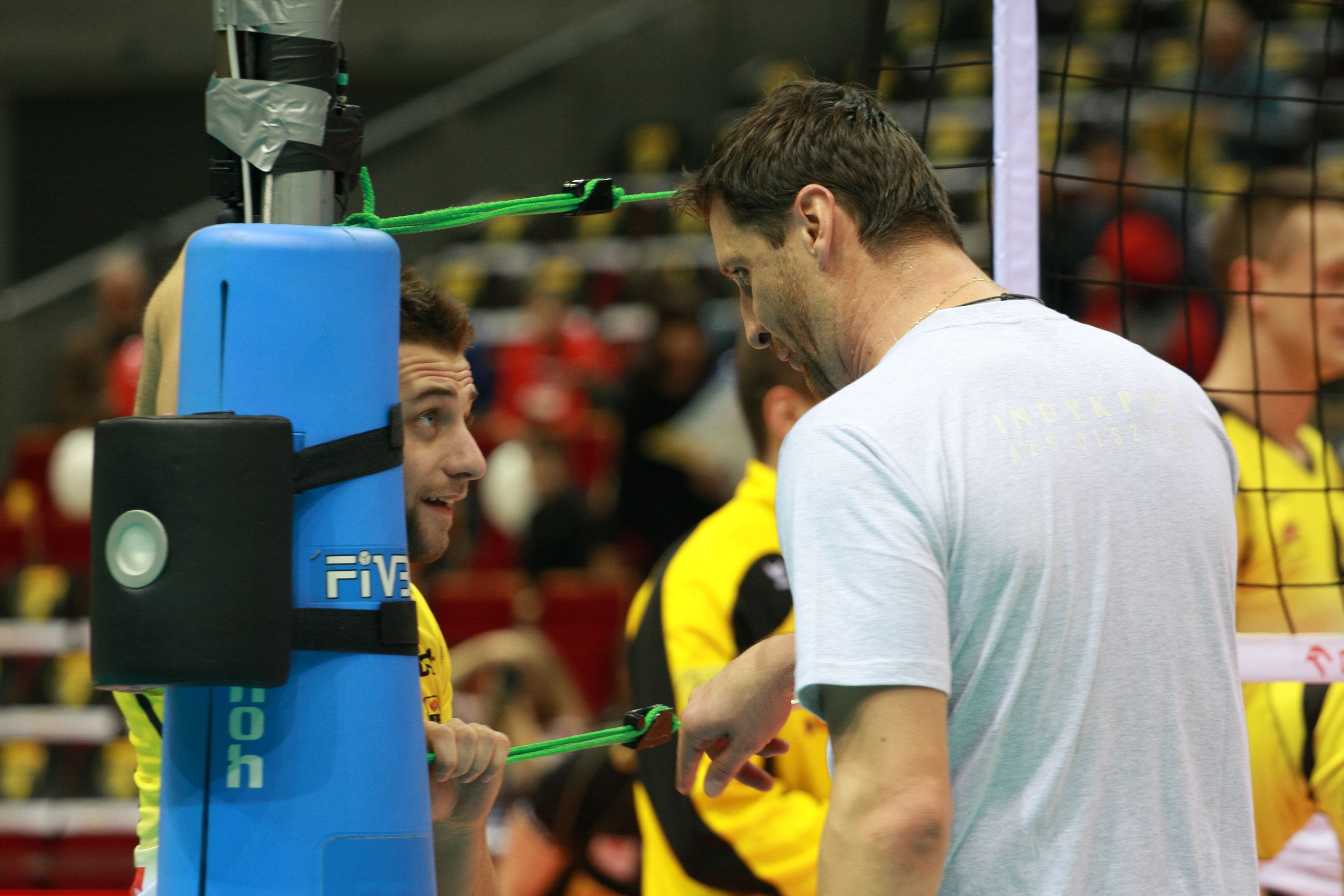 Piotr Gruszka